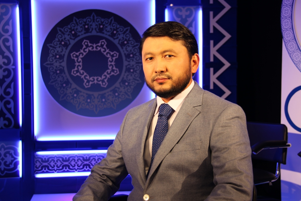 Мұхамеджан Тазабек